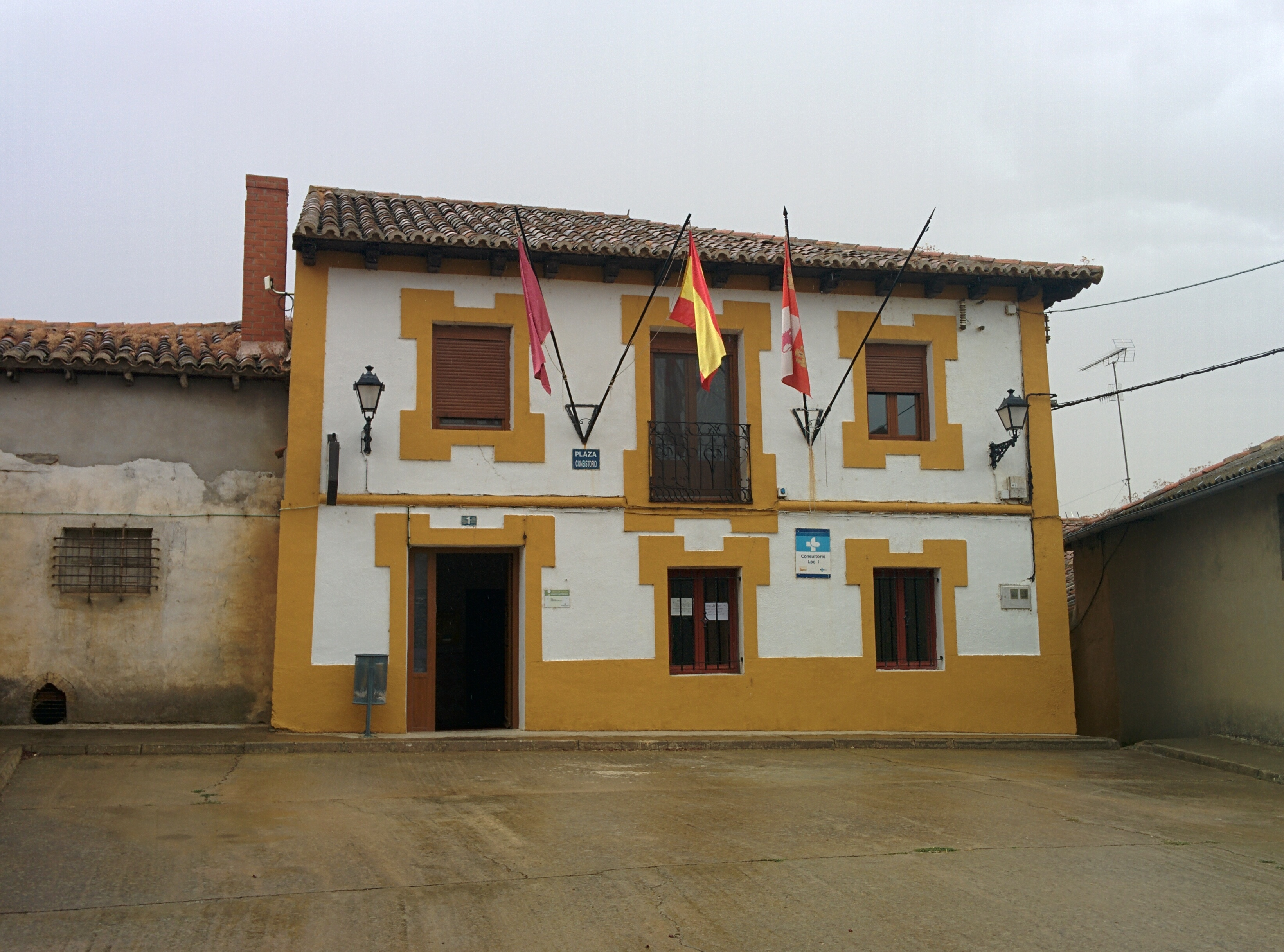 Ayuntamiento de Urones de Castroponce (Valladolid, España).